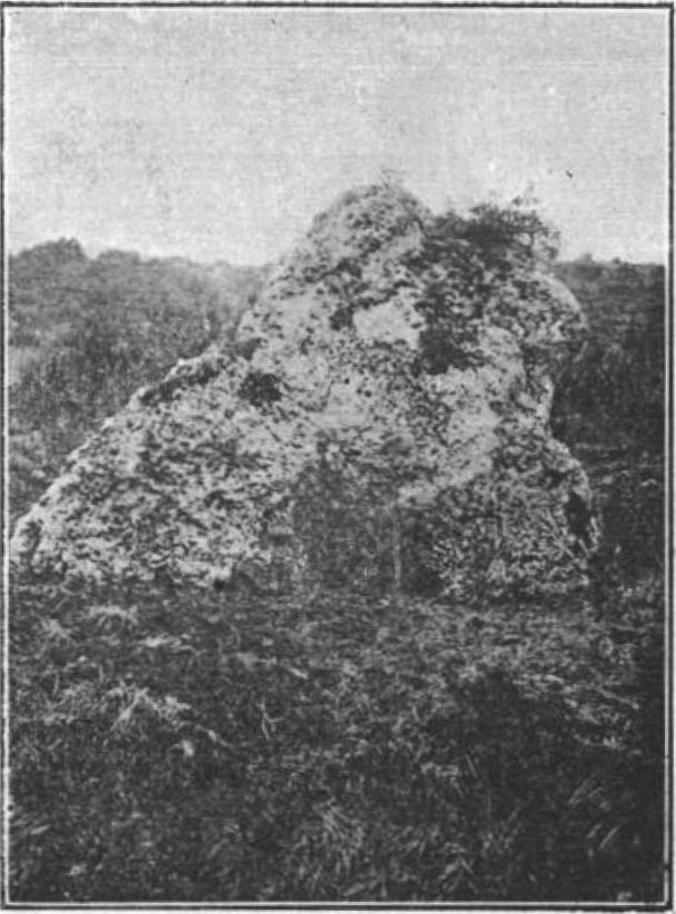 Photo du menhir appelé Caillou de Gargantua à Caillouet-Orgeville dans l'Eure. Prise en 1896 par P.-J. Chédeville